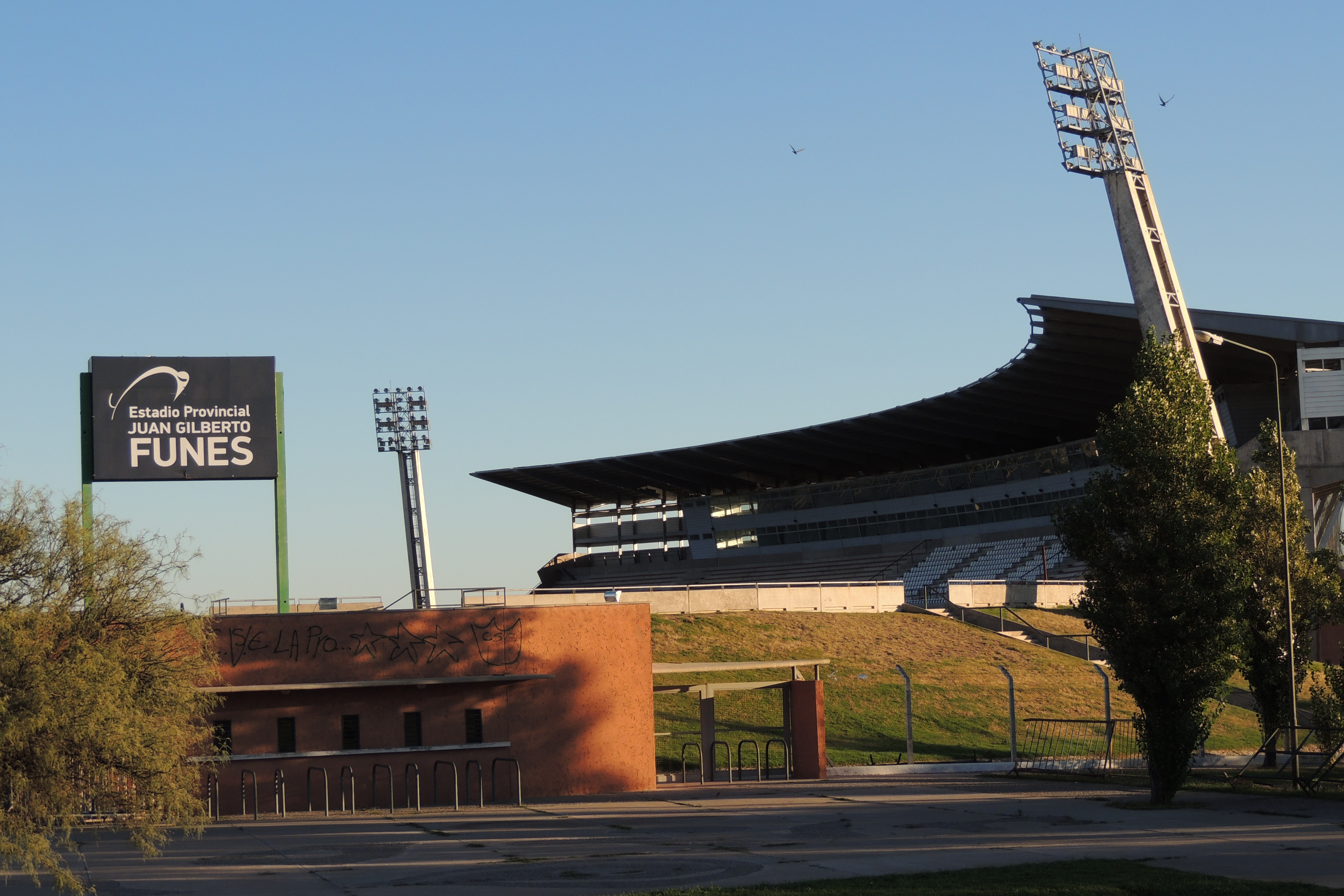 Estadio Juan Gilberto Funes, La Punta, San Luis